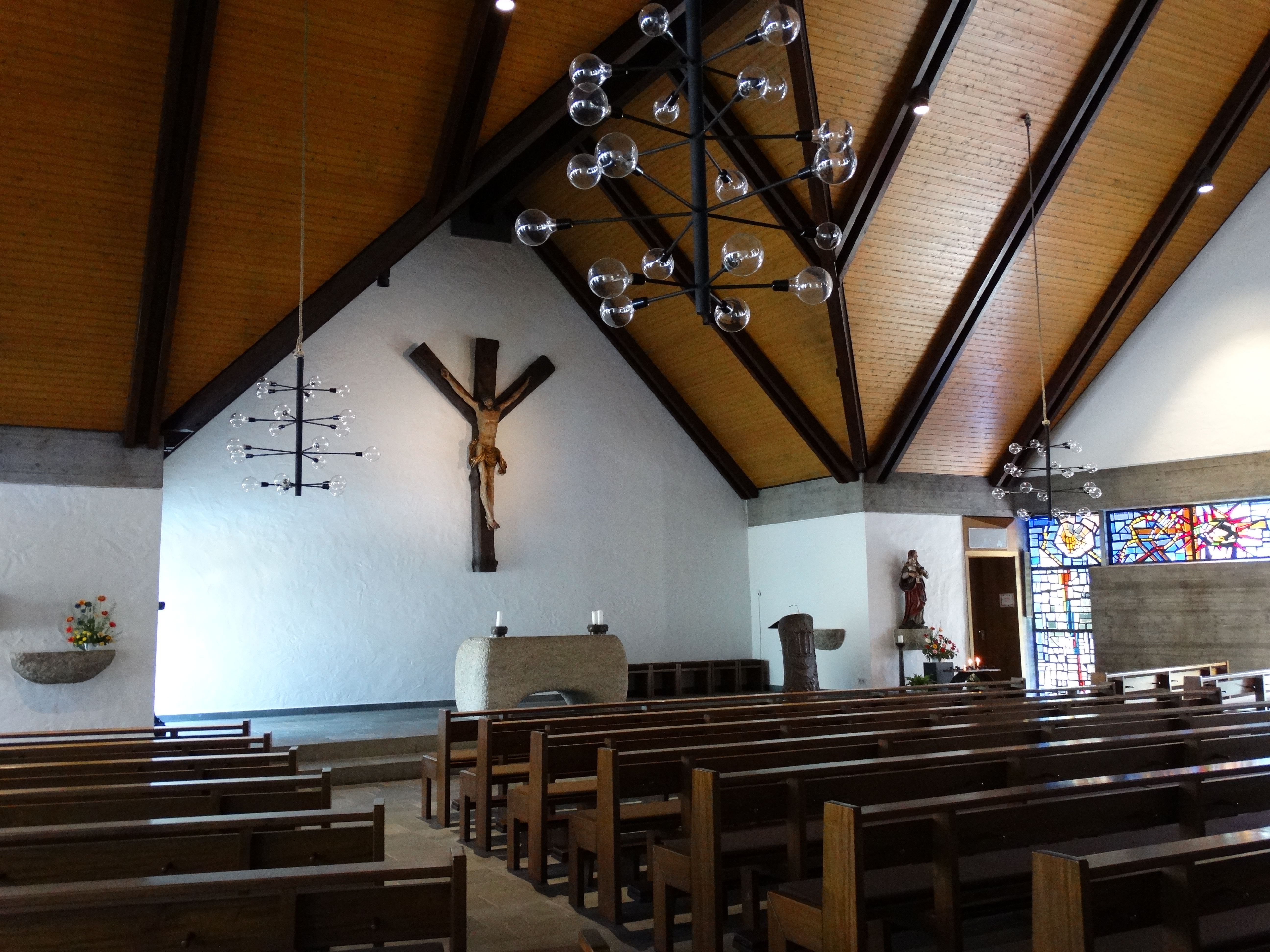 St. Piuskirche Hof, Innenansicht, Blick zum Altar